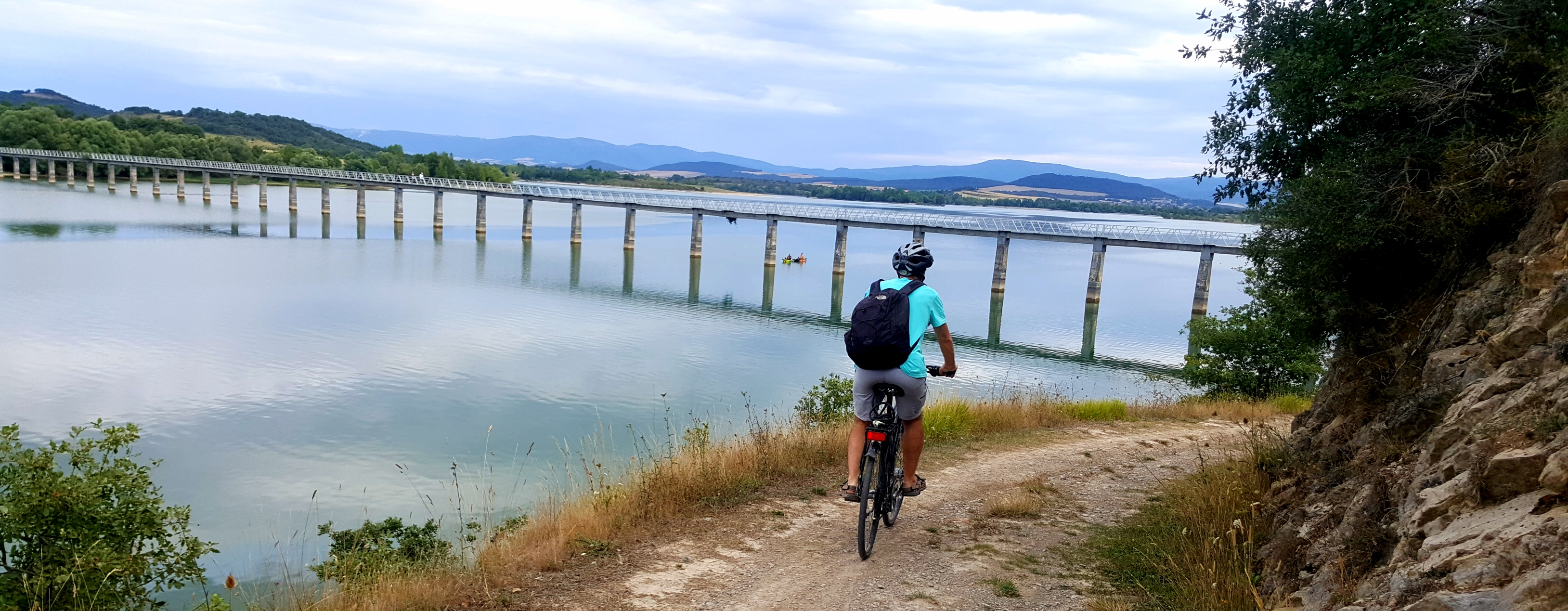 Ulibarri Ganboa urtegiko zubia